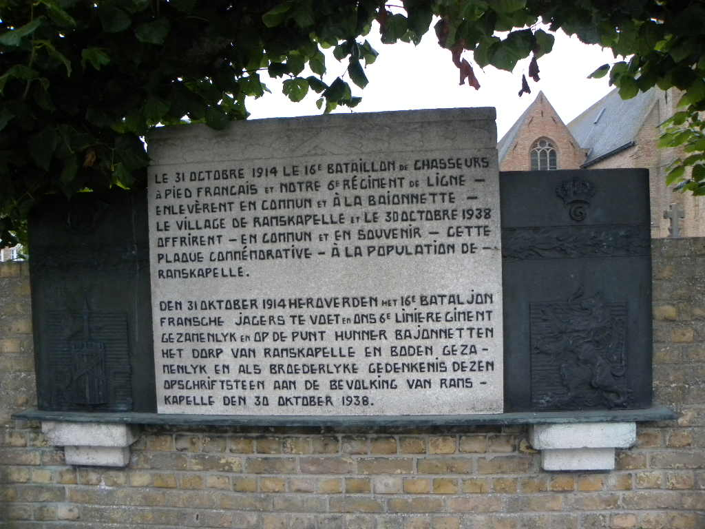 Monument au 16ème Bataillon du 6ème Régiment de Chasseurs à Pied devant l'église Saint Laurent à Ramskapelle (Nieuport). Inauguré en 1938.